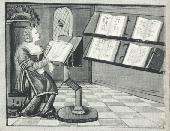 Bild der Dichterin Catherine d'Amboise.